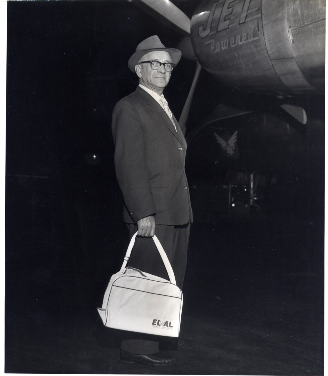 יעקב הוזמן עומד לפני מטוס נוסעים